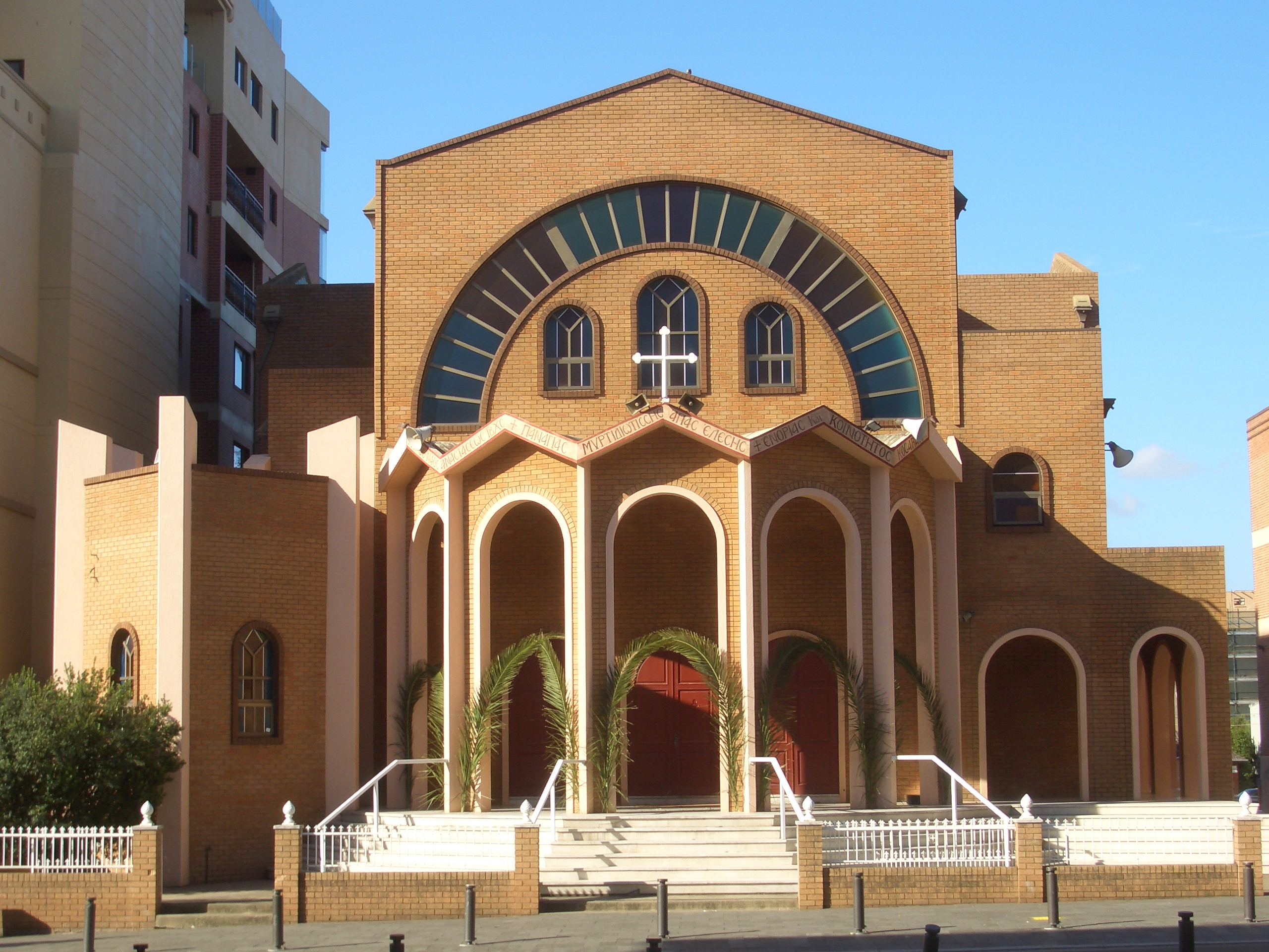 Kogarah